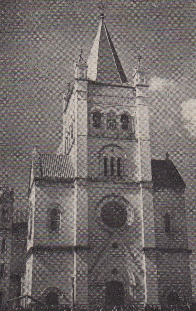 Fachada principal de la antigua Catedral de granito de Sonsón, siniestrada por un terremoto el 30 de julio de 1962.